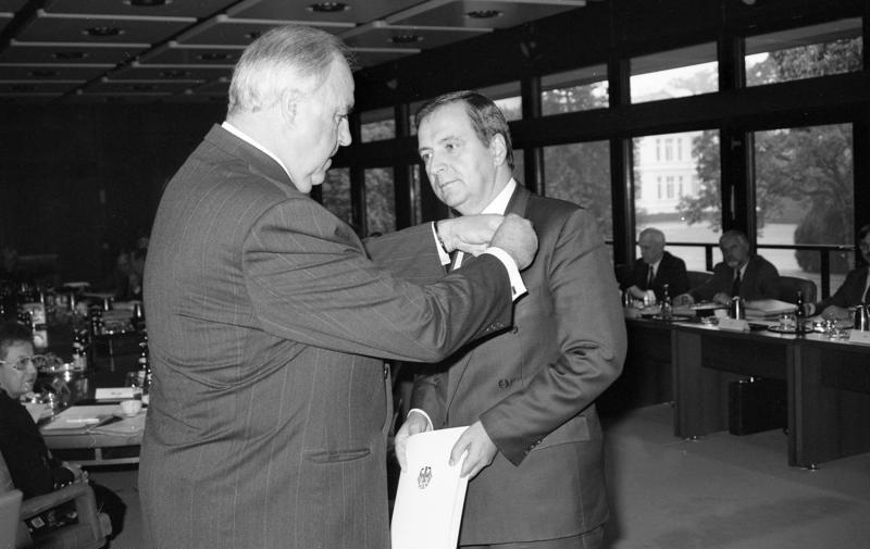 12.9.1990 Bundeskanzler Helmut Kohl überreicht Bundesminister für Arbeit, Dr. Norbert Blüm, Bundesminister für Umwelt, Prof. Dr. Klaus Töpfer und Bundesminister für Bildung und Wissenschaft, Jürgen W. Möllemann das Große Verdienstkreuz des Verdienstordens der Bundesrepublik Deutschland - am Rande der Kabinettsitzung im Bundeskanzleramt